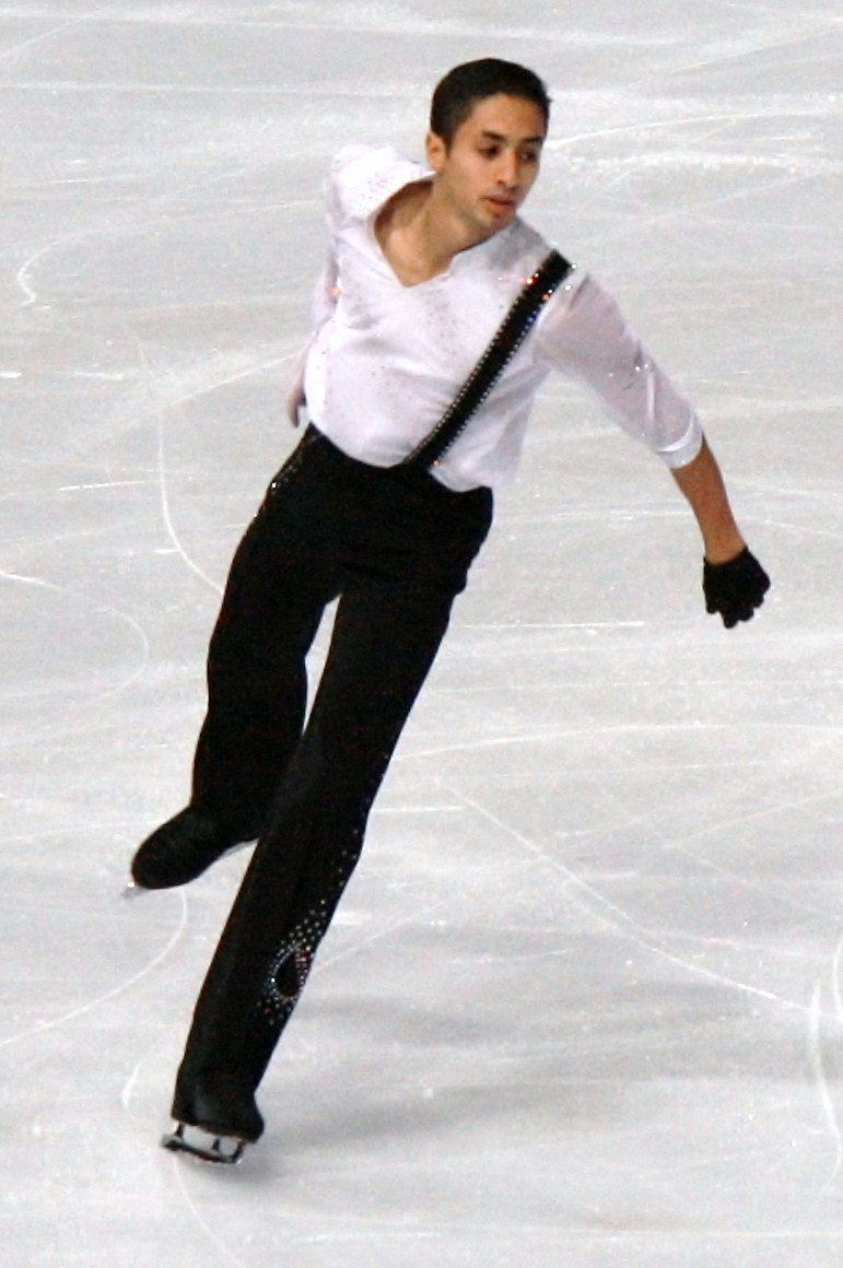 Шафик Бессегье на 2011 Trophée Eric Bompard